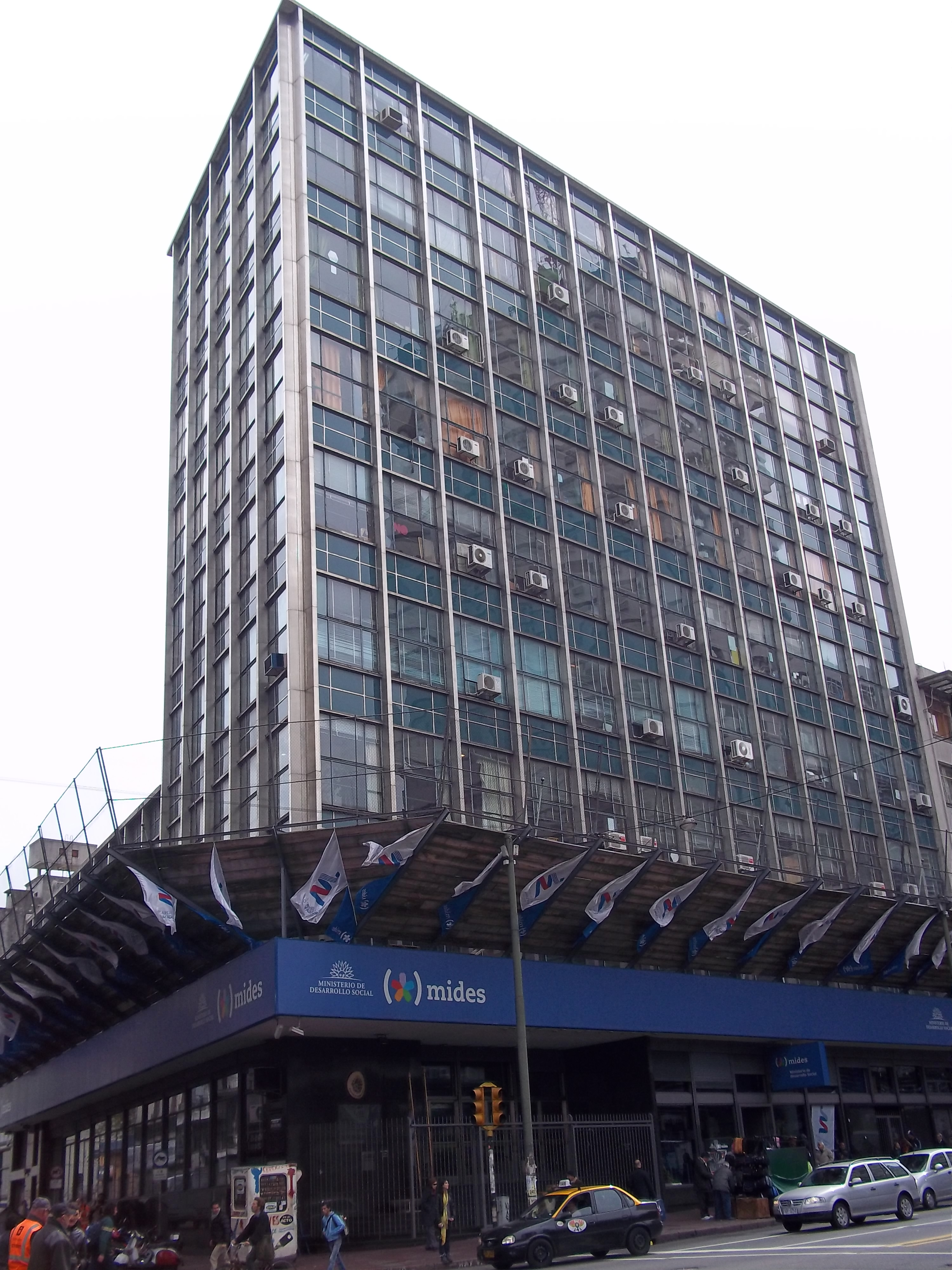 Edificio del Ministerio de Desarrollo (MIDES), Montevideo, Uruguay. El frente da a la calle 18 de julio, justo ubicado en la esquina del Monumento al Gaucho.